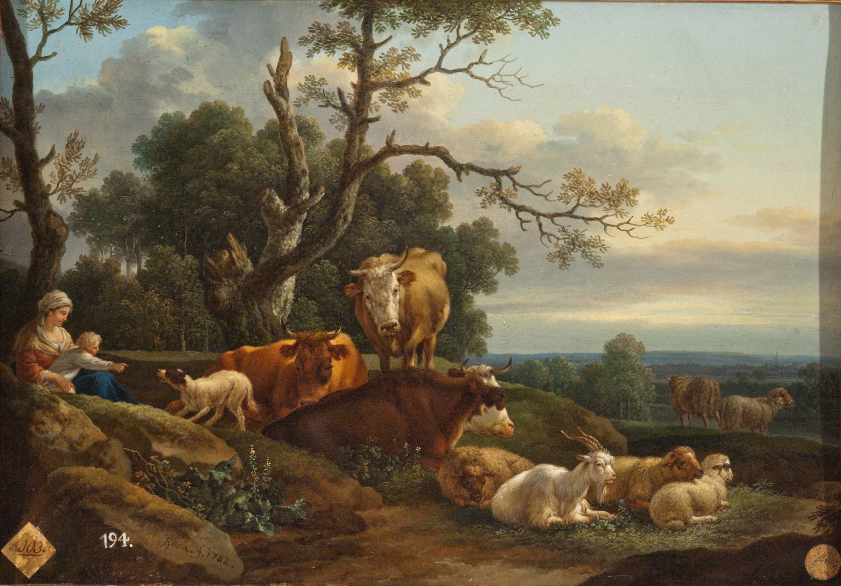 Joseph Roos: Pastora con niño y ganado, óleo sobre tabla, 48 x 68 cm, Madrid, Real Academia de Bellas Artes de San Fernando. Firmado "Rosa f. 1782". El inventario de pinturas de la Real Academia de Bellas Artes de 1796-1805 dice "pintado por Dn. Joseph Rosa Director de la Galería Imperial de Viena"